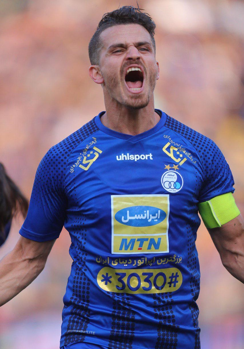 نگاره‌ای از دیدار دو تیم استقلال و صنعت نفت آبادان در ۱۴ آبان ۱۳۹۸ در ورزشگاه آزادی که تیم استقلال با نتیحه ۵-۰ پیروز دیدار شد. (مشاهده گزارش بازی)